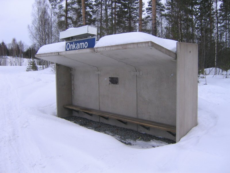 Onkamo railwaystation (suspended), Finland. Onkamon pysäkki, liikenne lakkautettu. Photo M. Passinen.